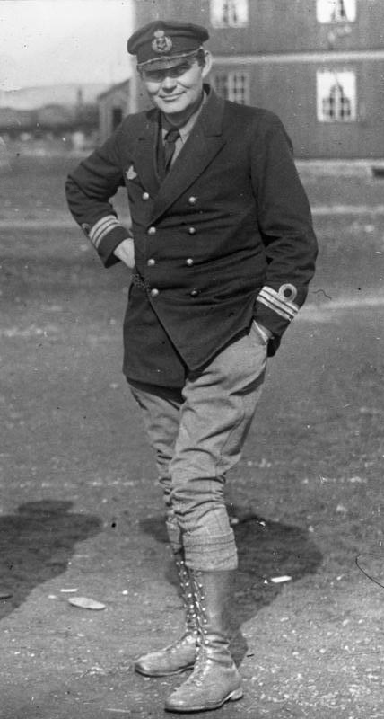 Eine Riiser-Larsen-Expedition in die unbekannten Gebiete des Nordpols! Riiser-Larsen, der Leiter der Antarktis-Expedition begleitete seinerzeit Roald Amundsen bei seinen beiden Forschungsreisen nach dem Nordpolgebiet.